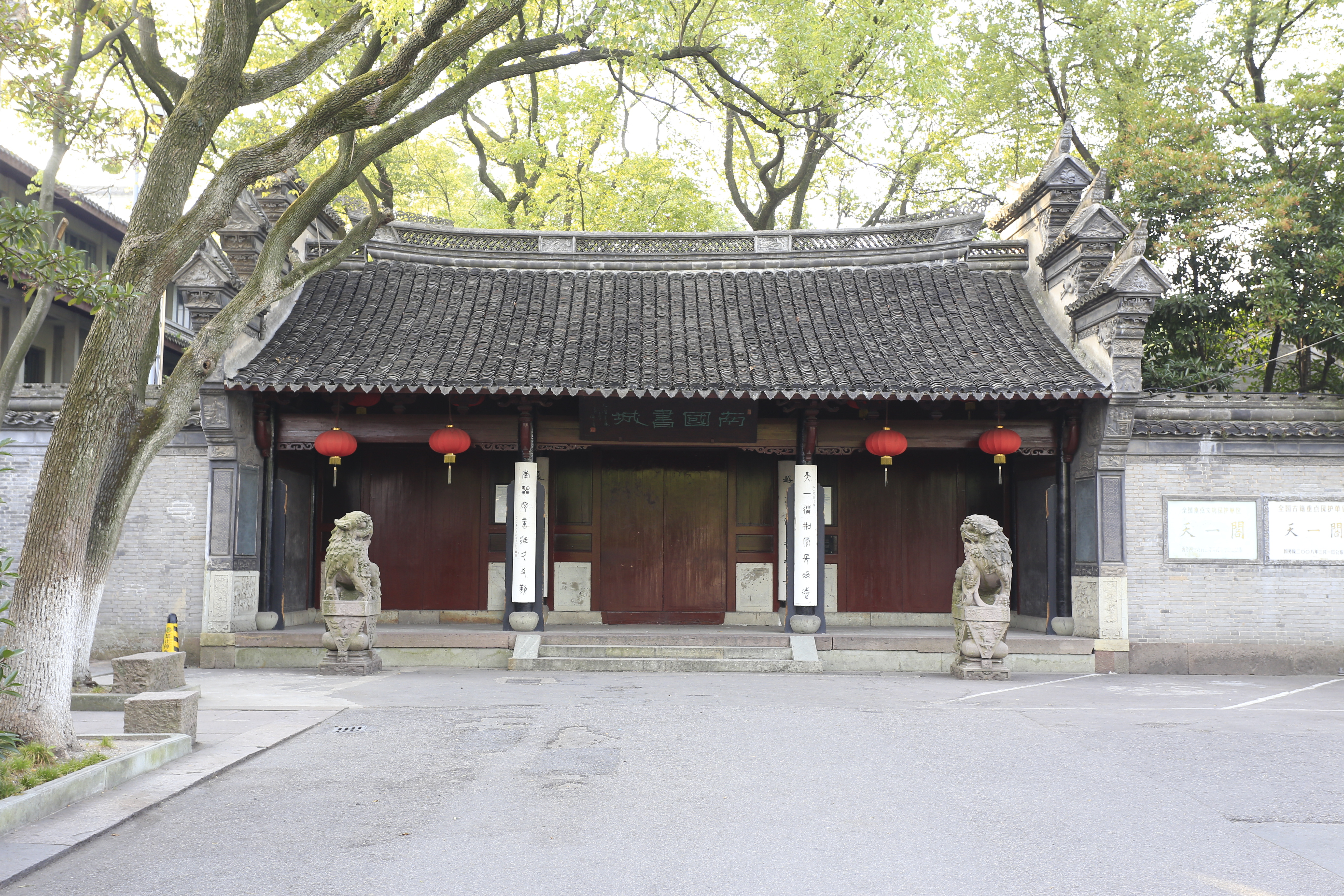 宁波天一阁 —— 正门